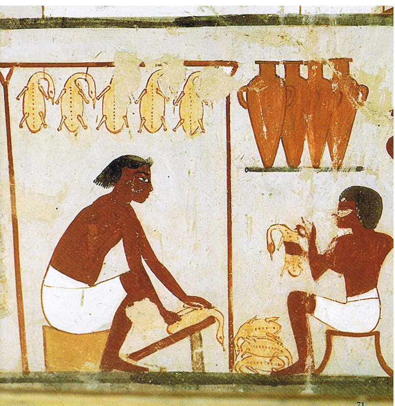 Geflügel rupfen und ausnehmen